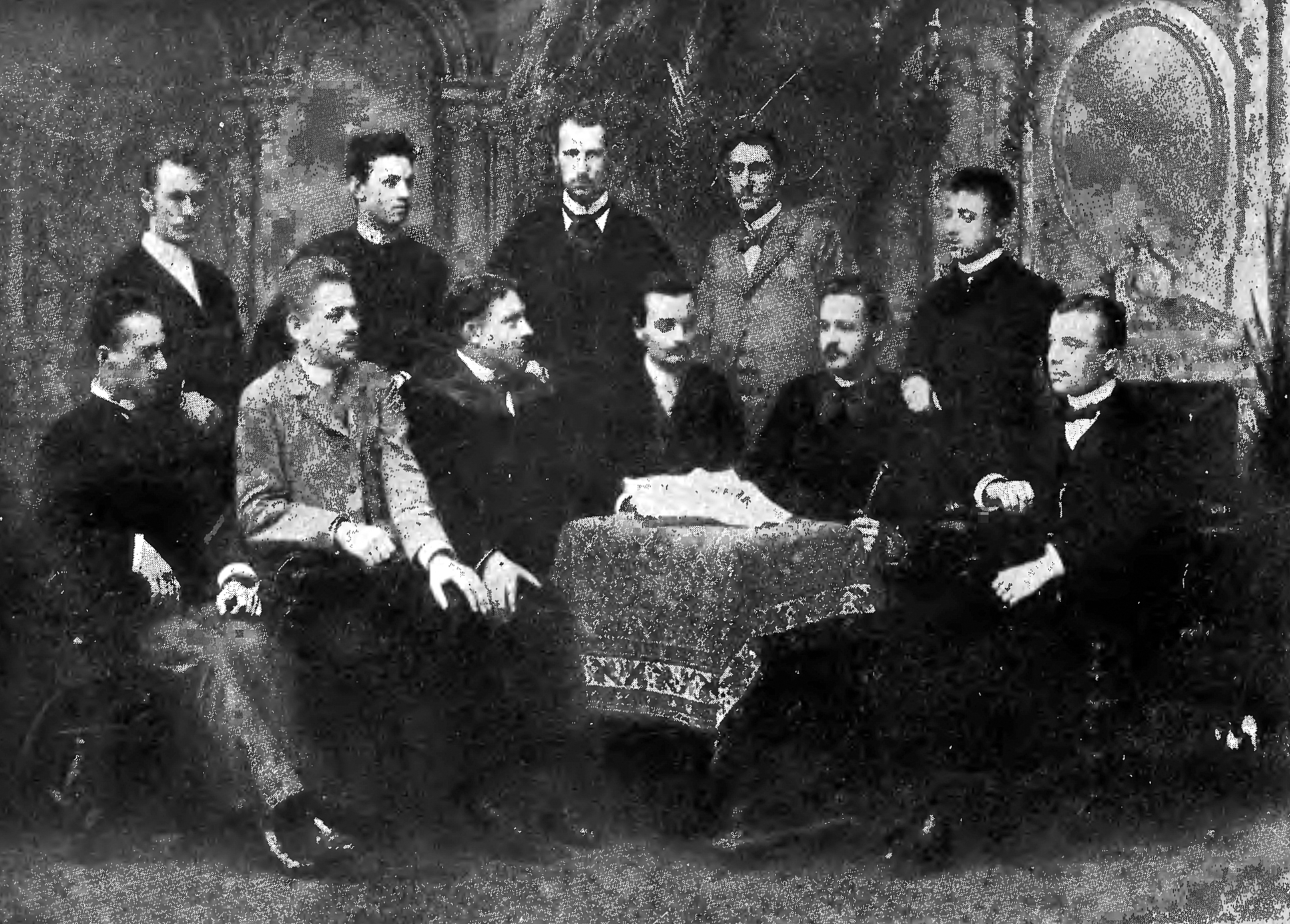 Komitet redakcyjny pisma "Życie" ze Lwowa. Stoją: Leopold Szenderowicz, Kazimierz Zipser, Stanisław Aleksandrowicz, Jarmulski, Adam Cehak. Siedzą: Eugeniusz Reiter, Jędrzej Moraczewski, Wacław Borzemski, Antoni Cybański, Bolesław Błażek, Karol Ruebenbauer.